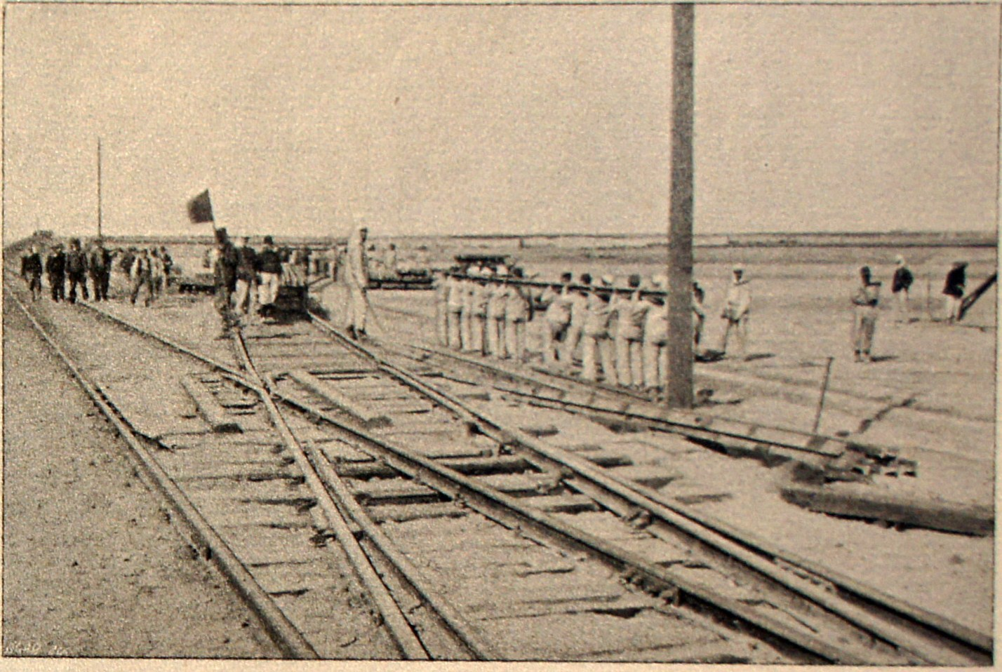 Construction_de_voie_pour_les_manoeuvres_aiguillage pour les grandes manoeuvres de 1901 devant le Tzar.